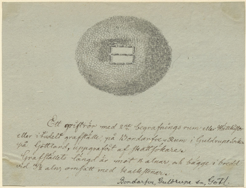 RAÄ-nummer Guldrupe 11:1. Röse med dubbelgrav. Plundrad enligt uppgift. Tuschteckning troligen från J.G. Liljegrens samling från 1800-talets början. Motiv: Guldrupe 11:1 Kategori: Röse, Teckning RAÄ-nummer Guldrupe 11:1. Röse med dubbelgrav. Plundrad enligt uppgift. Tuschteckning troligen från J.G. Liljegrens samling från 1800-talets början. Guldrupe 11:1.